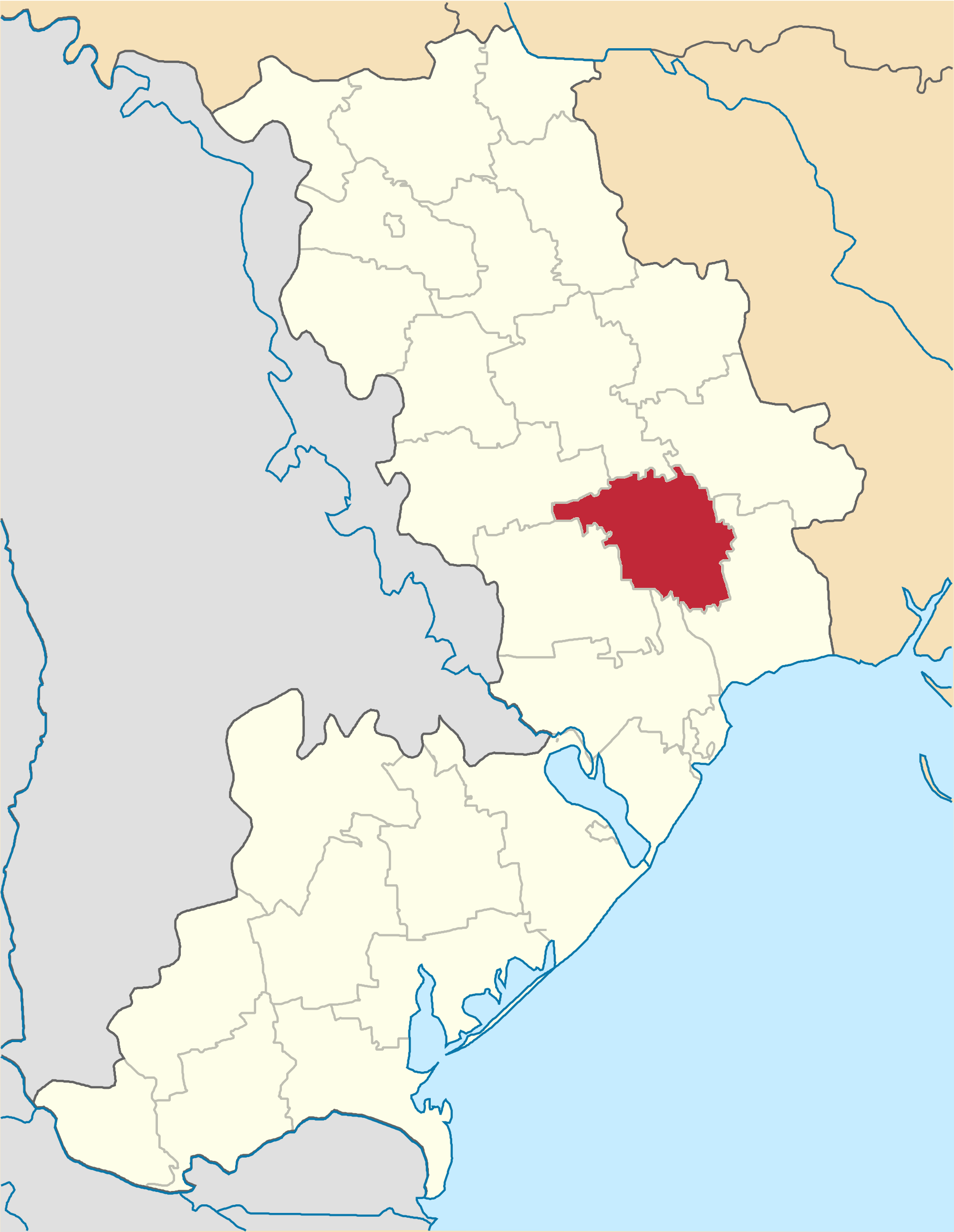 Ivanivskyi-Raion map